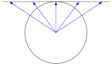 Gnomonische Projektion - Prinzipskizze